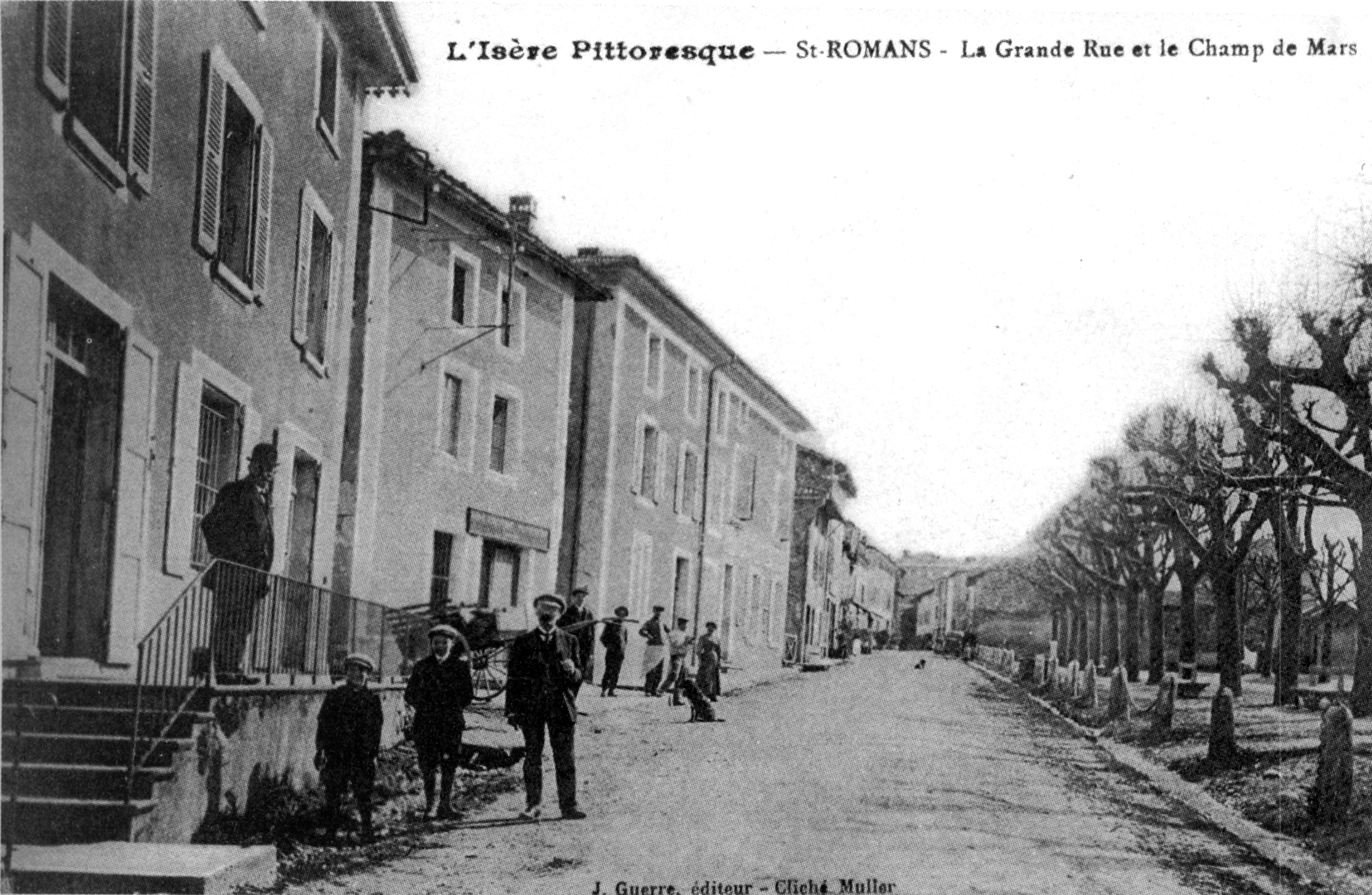 Saint-Romans, la Grande Rue et le Champ de Mars, 1910